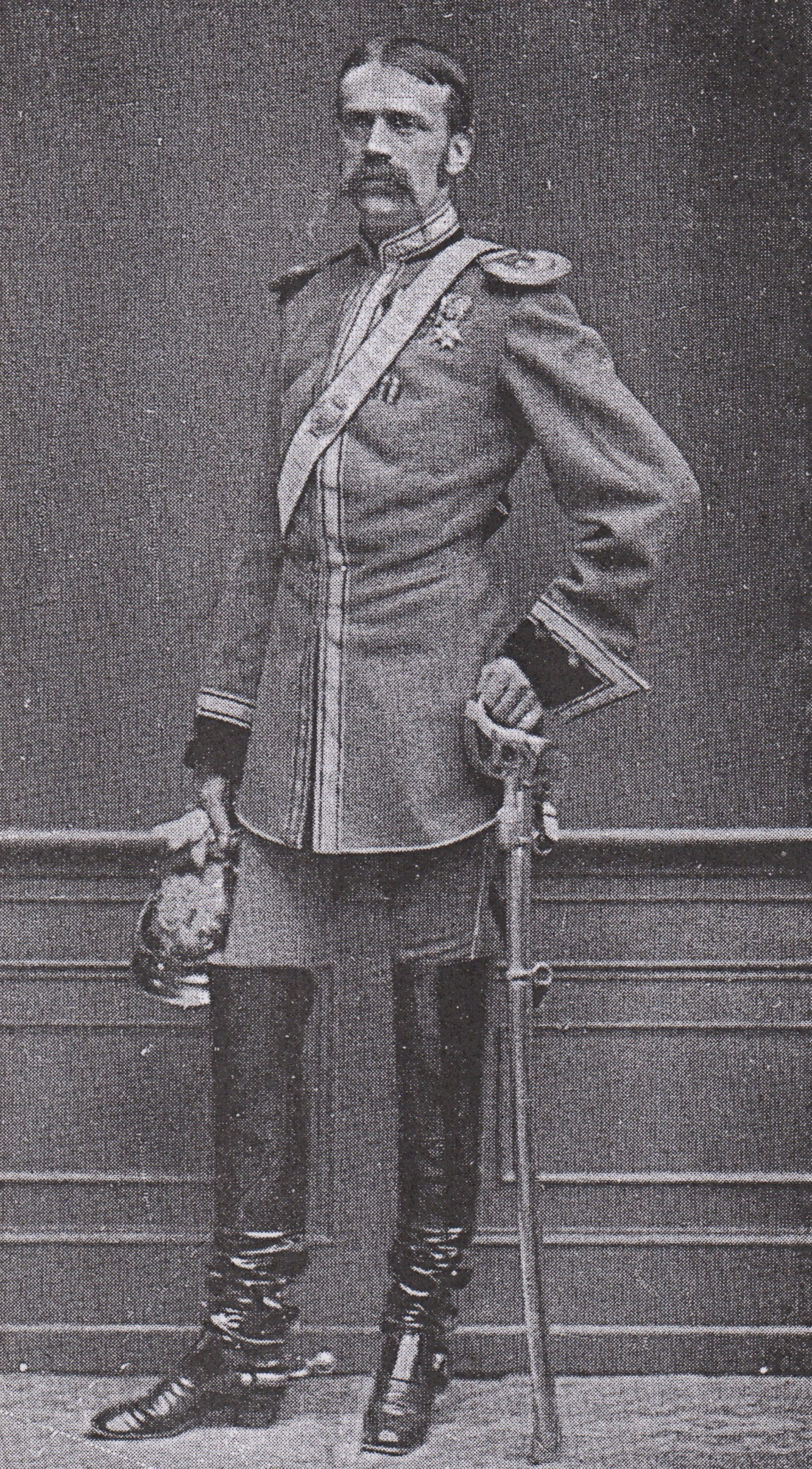 Fritz von Uhde (1848-1911), german painter